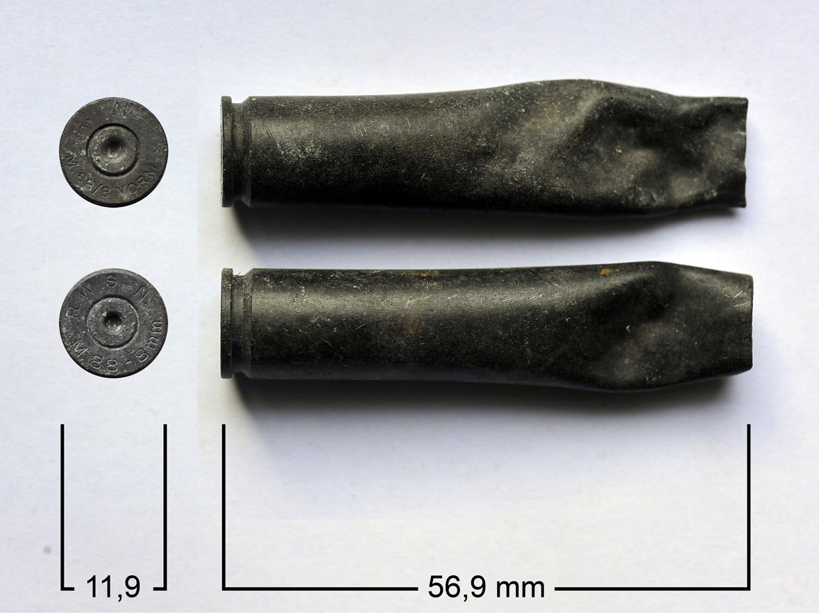 2 Patronen für Gewehr 88. Fundort: Namibia, ehemals Deutsch Südwestafrika, Farm Neuhof-Kowas, verwendet von der deutschen Schutztruppe